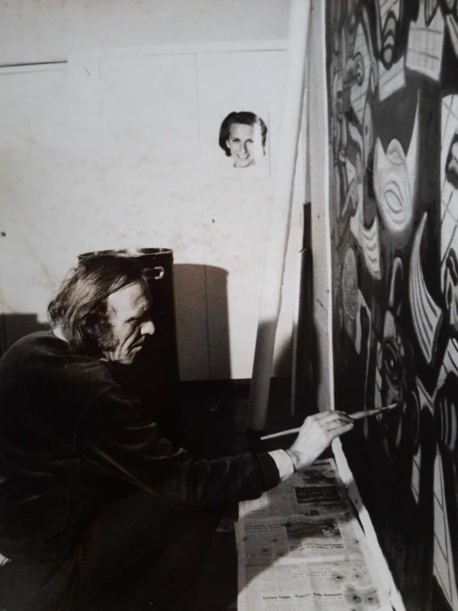 al lavoro